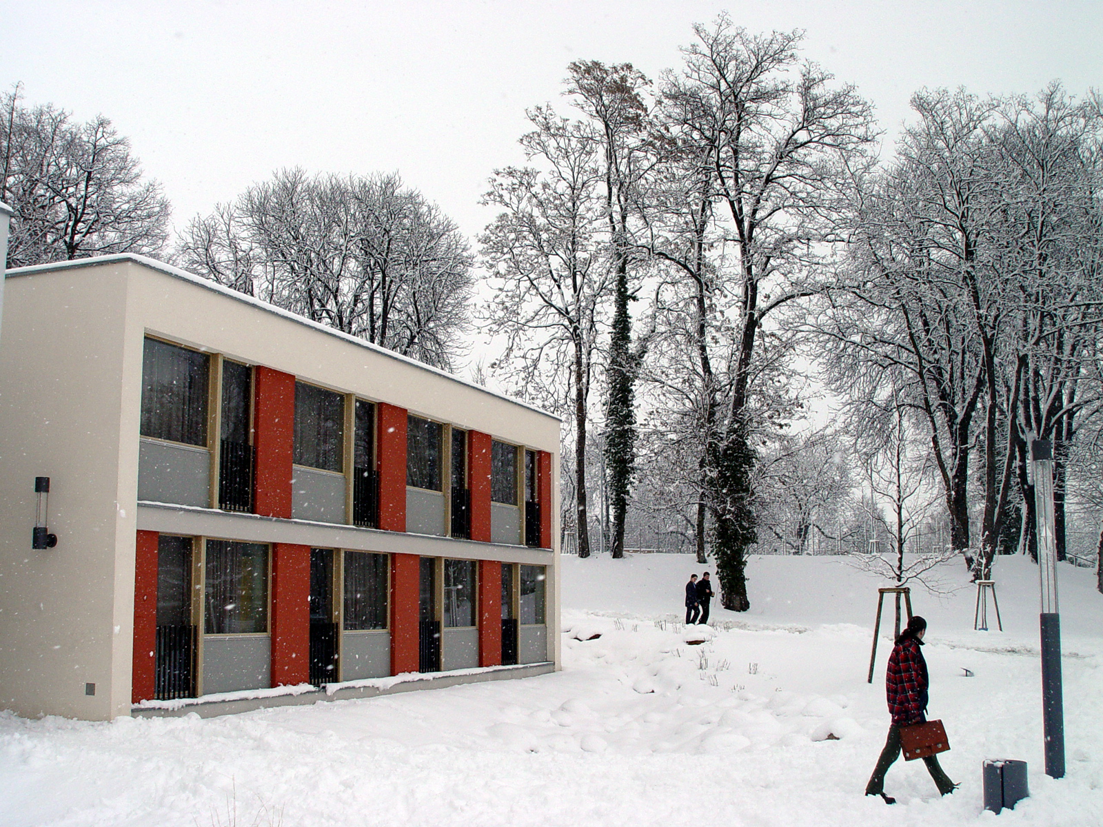 Internatsgelände im Winter